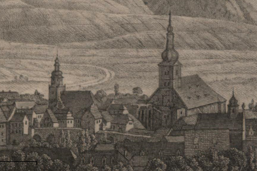 Bad Kreuznach: Wilhelmskirche (links), Pauluskirche (rechts) und Brückenhäuser auf der alten Nahebrücke, um 1825. Ausschnitt aus: Ansicht von Creuznach